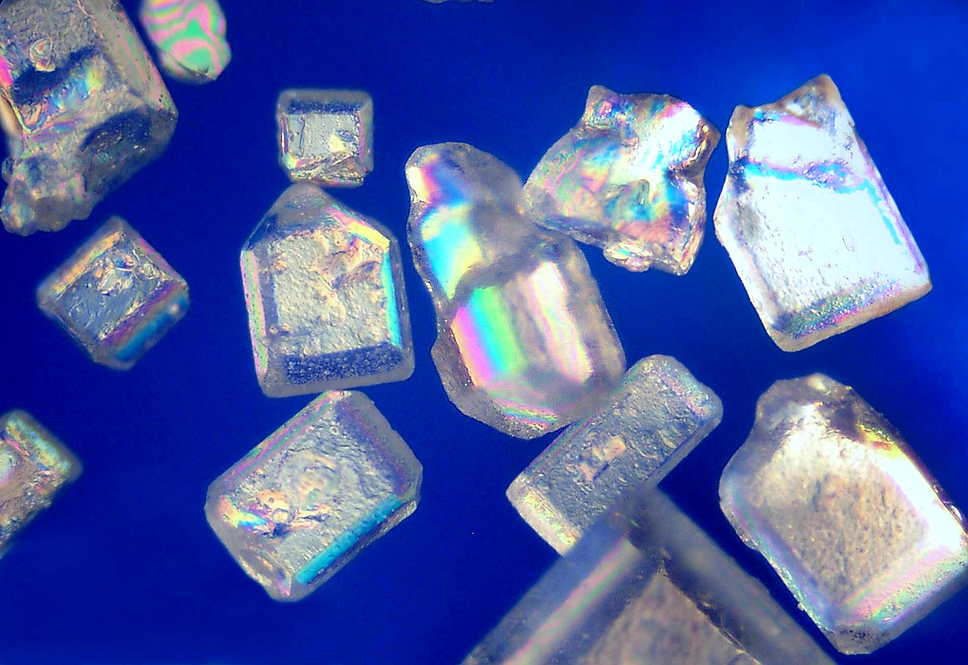 Zucker bei 150fach mit Polfilter. Ausschnitt ca: 800µm x 500µm